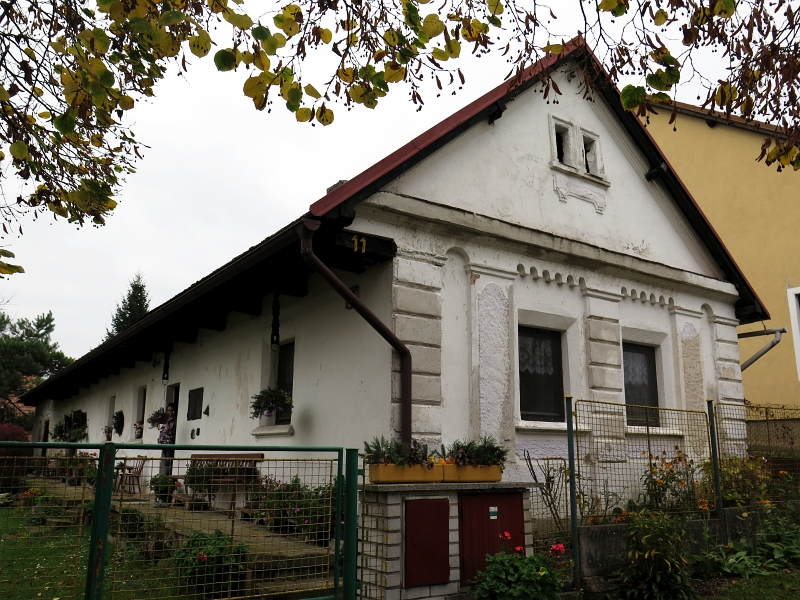 Usedlost čp. 11, Střihov 11, Střihov.